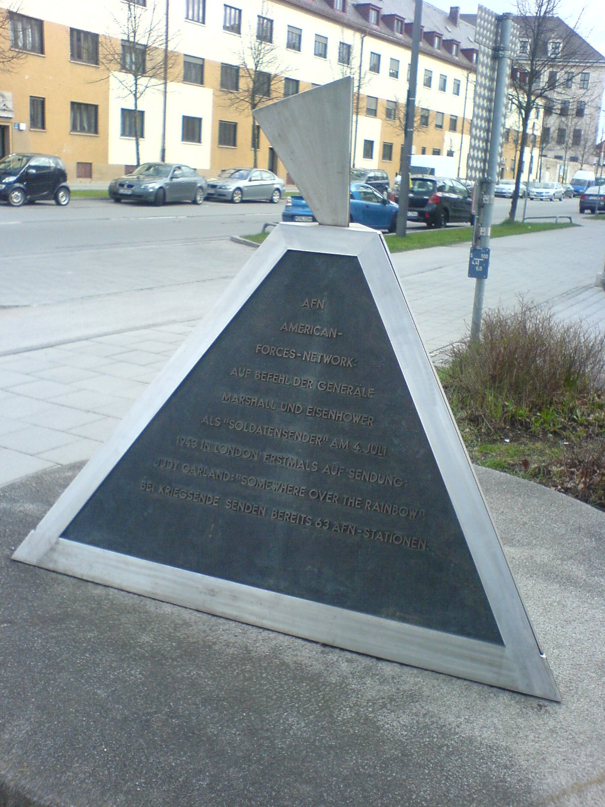 München - AFN-Pyramide in der Nähe des ehemaligen Sendemasten (Soyerhofstr.)